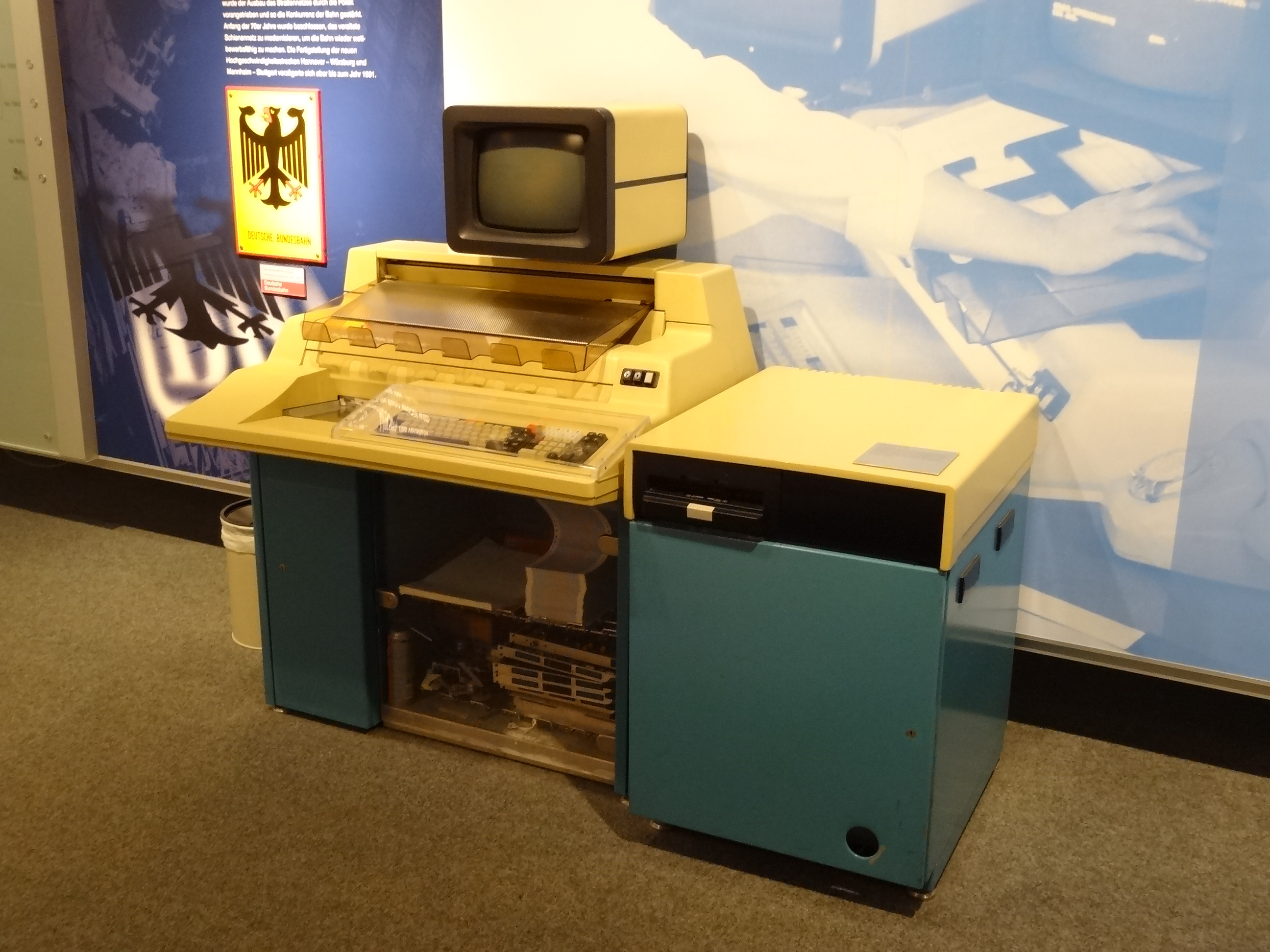 Datenstation TA 1069. 1975/76 von Triumph-Adler für die Bundesbahn entwickelt. Im Rahmen des Programms "Modernisierte Fahrausweiserstellung" (MOFA) wurden 1977-1981 5500 Stationen ausgeliefert